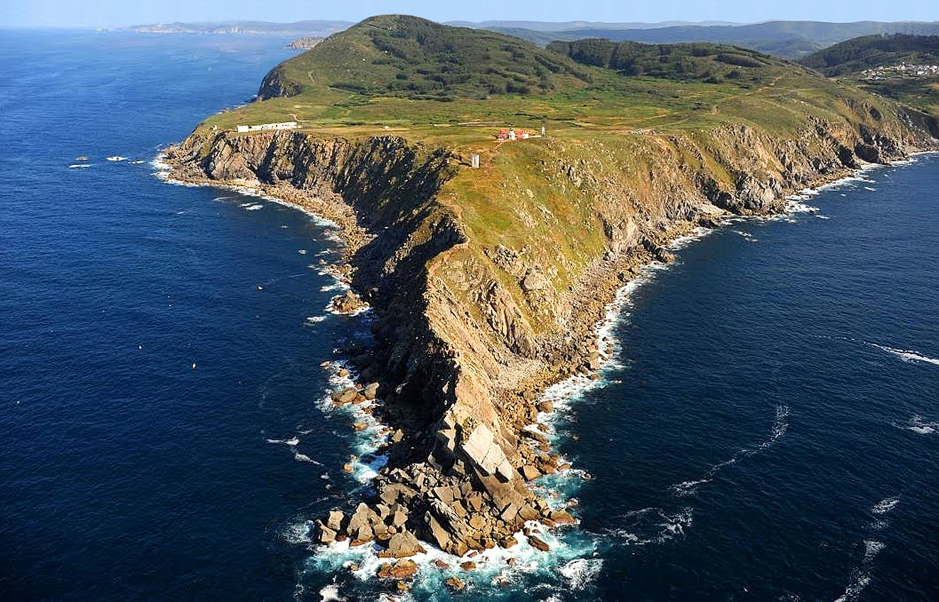 Cap de la Estaca de Bares - Vue aérienne de la Punta de la Estaca de Bares, du phare et de la station américaine LORAN